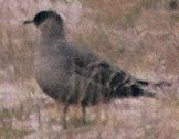 Stercorarius parasiticus (Labbo) fotografato nello Snæfellnes (Islanda occidentale) agli inizi di luglio 2004. È stato identificato come labbo e non come Stercorarius skua (Stercorario maggiore) in quanto in fase di osservazione in natura mostrava la coda allungata tipica (differente dal labbo codalunga).